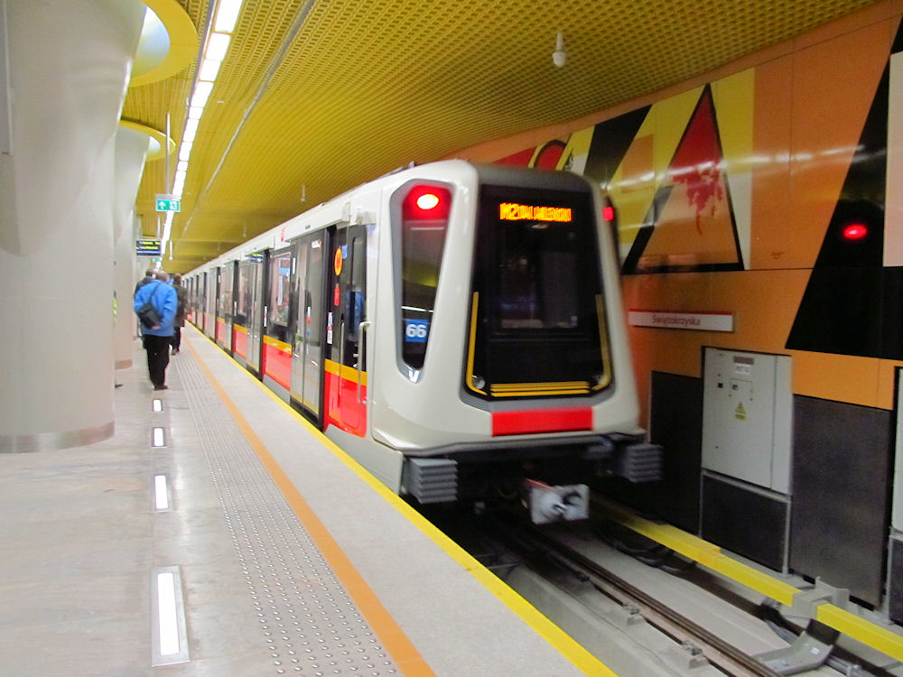 Metro, second line (M2), station Świętokrzyska. 08.03.2015 r.